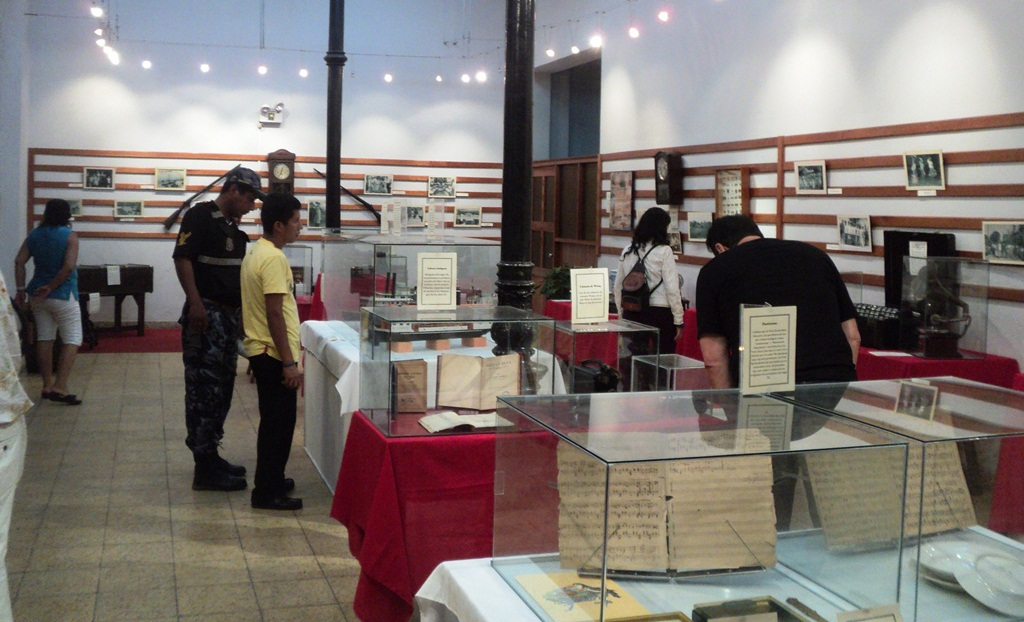 Museo temporal en Iquitos que presenta artículos antiguos durante la fiebre de caucho en la ciudad.